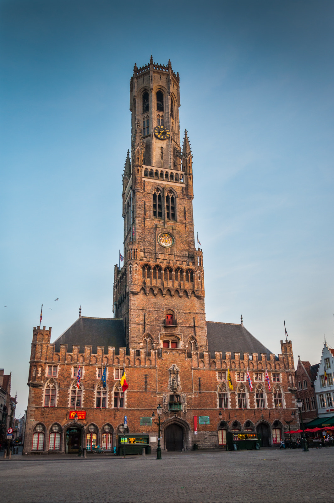 500px provided description: Bruges Belford [#2014 ,#Belford ,#Tower ,#Belgium ,#Bruges ,#kristofz]